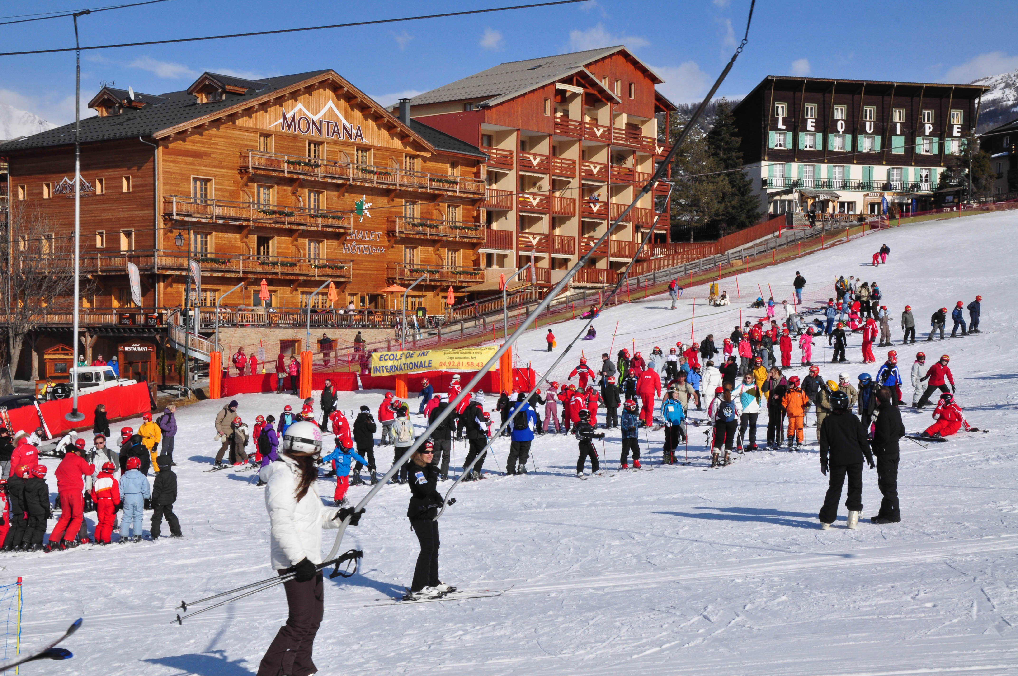 Sauze Super Sauze